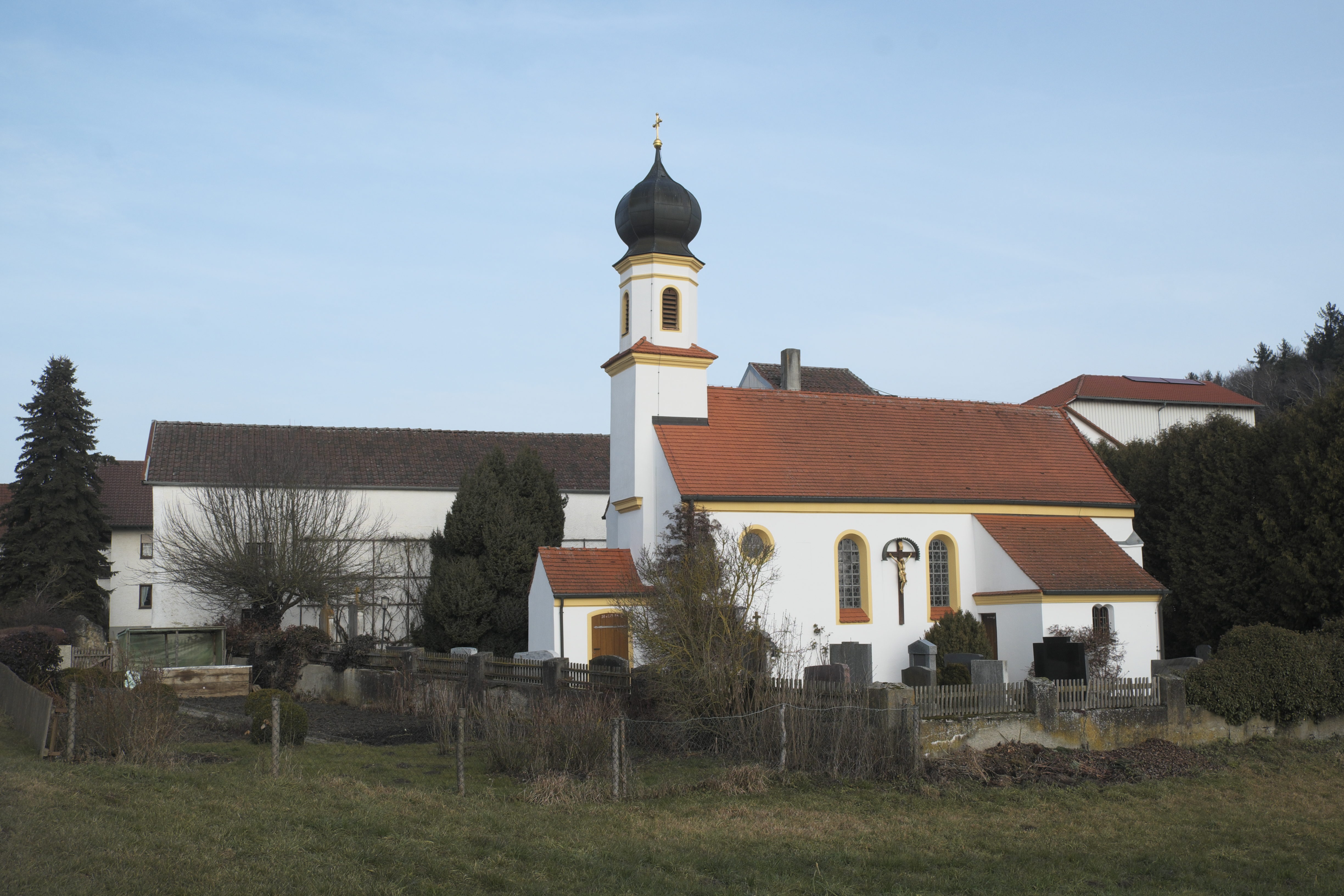 Katholische Filialkirche St. Ulrich in Holzhausen (Schweitenkirchen) im oberbayerischen Landkreis Pfaffenhofen an der Ilm (Bayern/Deutschland)